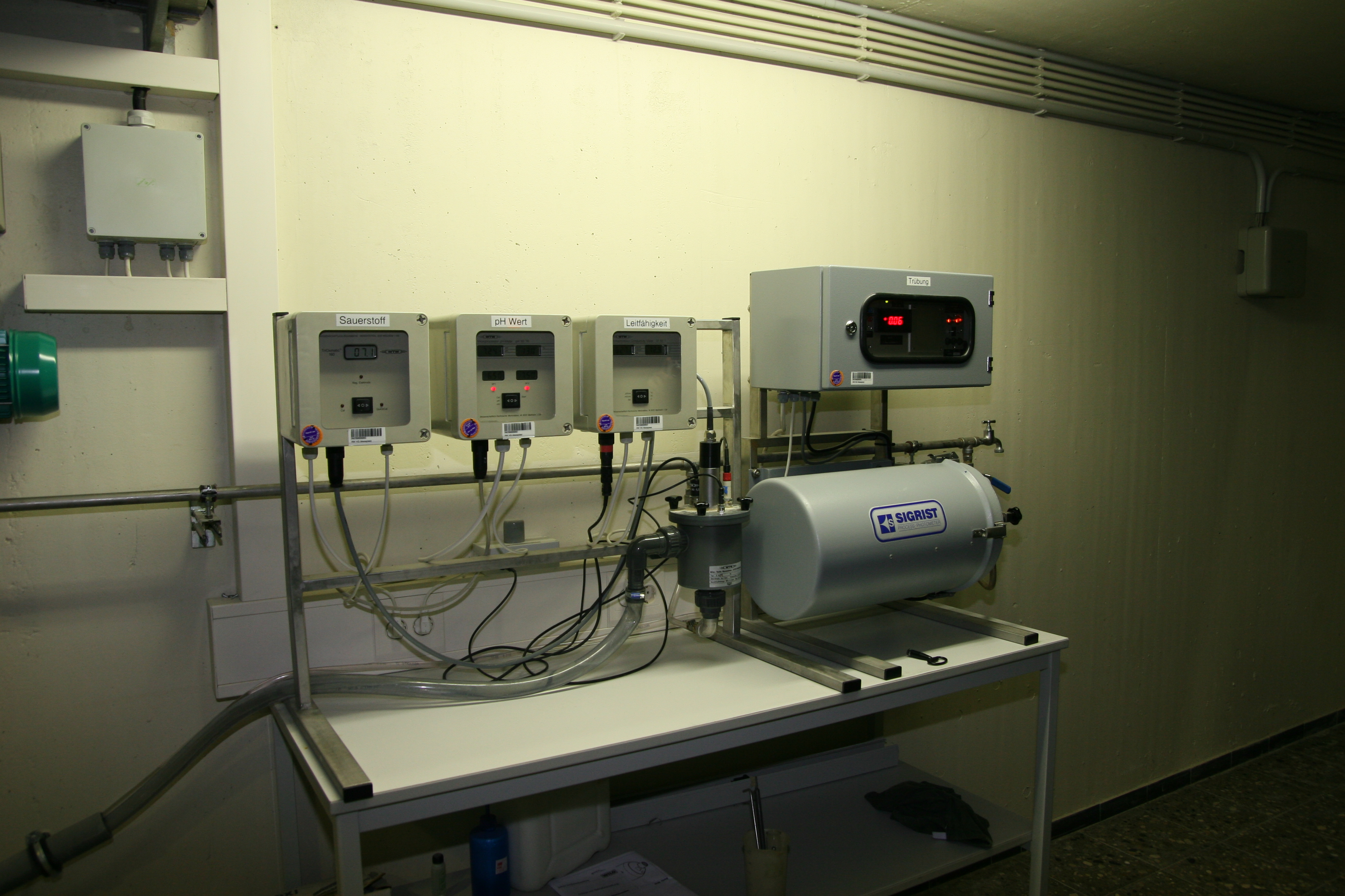 Messstation zur Ermittlung und Überwachung der Wasserqualität im Wasserwerk Elchesheim-Illingen, einem Werk der Stadtwerke Karlsruhe.